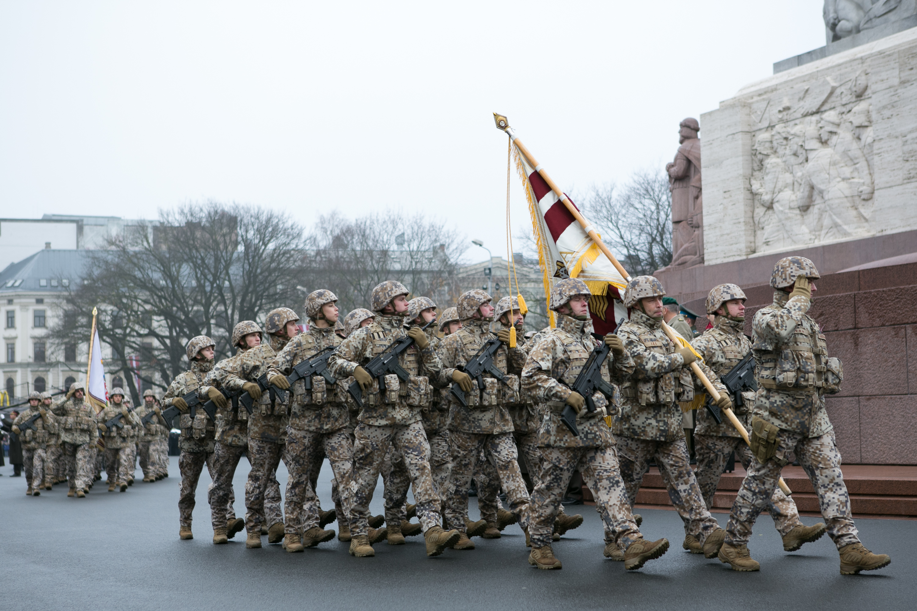 2013.gada 11.novembris. Nacionālo bruņoto spēku un Iekšlietu ministrijas vienību militārā parāde pie Brīvības pieminekļa. Foto: Ernests Dinka, Saeimas Kanceleja Izmantošanas noteikumi: saeima.lv/lv/autortiesibas